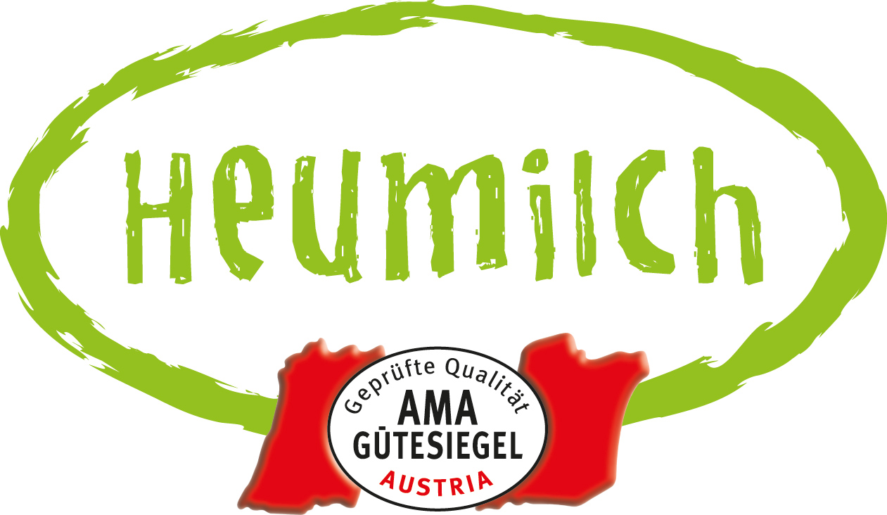 Heumilch-Logo